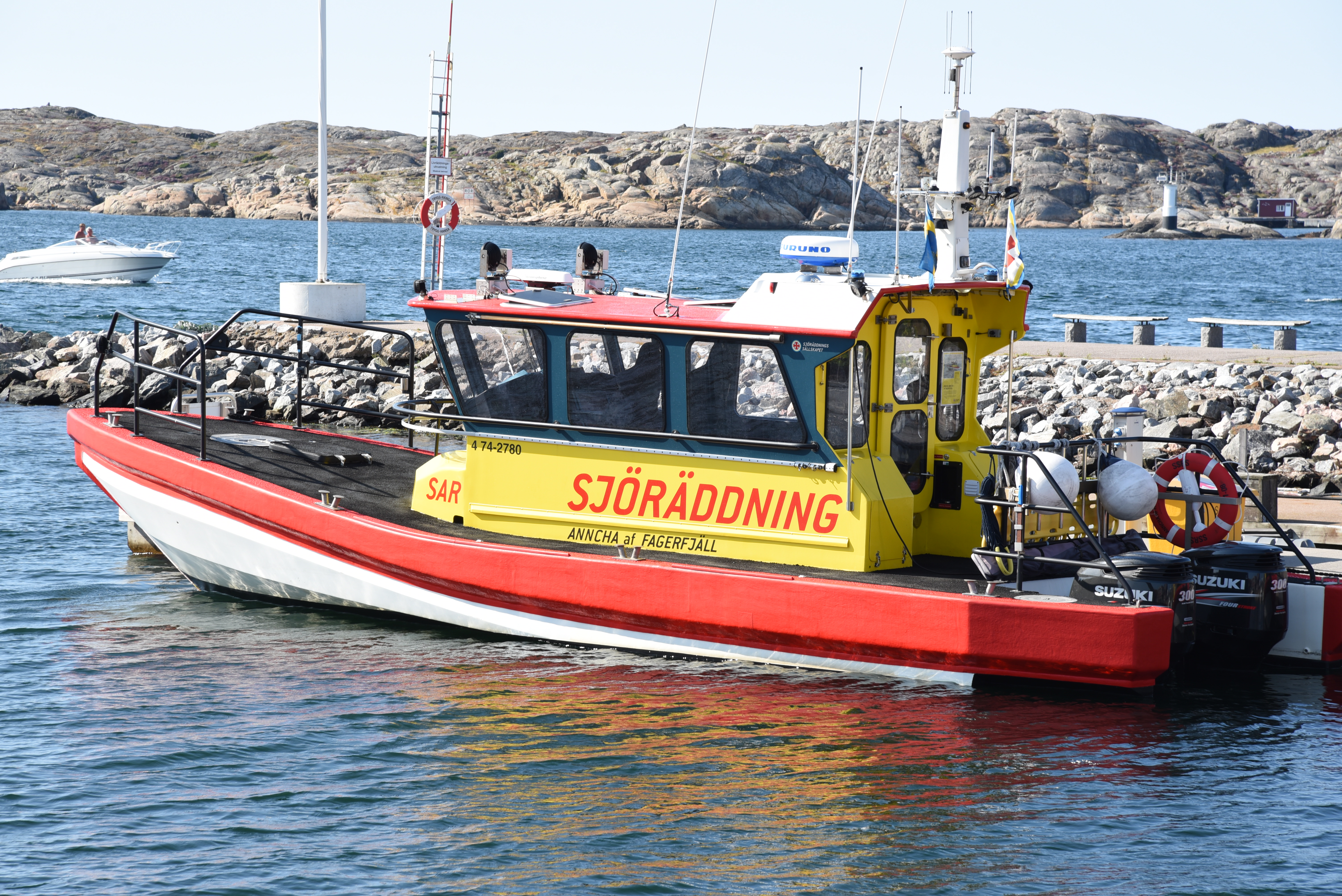 Rescue Anncha af Fagerfjäll i Skärhamn.